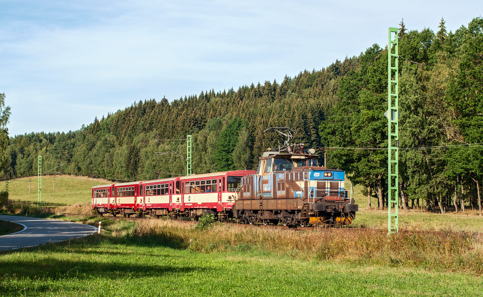 Elektrická lokomotiva 210.039 ČD s osobním vlakem Lipno nad Vltavou - Rybník u Jenína.